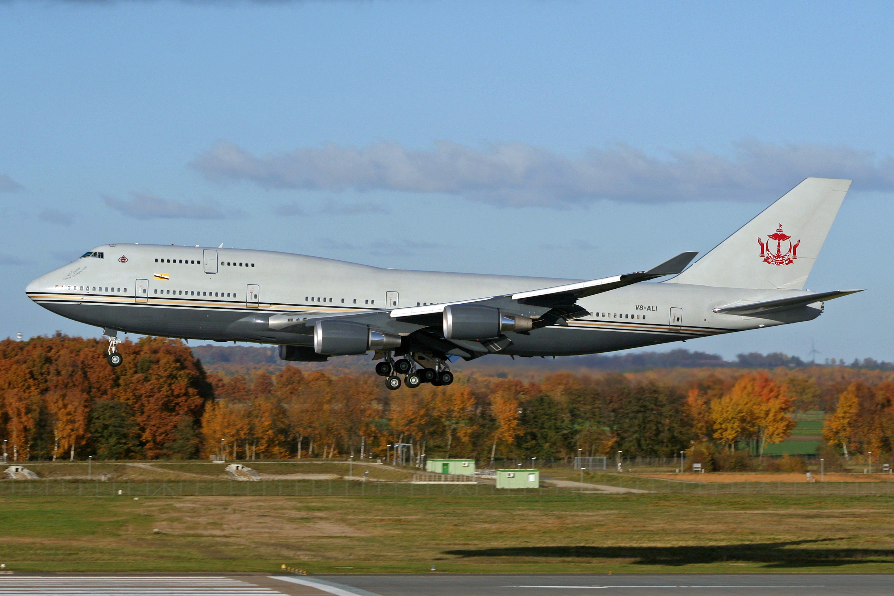 Boeing 747-430 Brunei Sultan's Flight V8-ALI